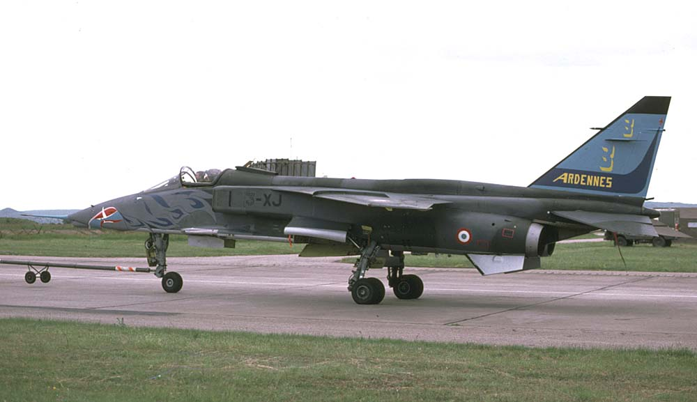 Jaguar du 3/3 au sol.